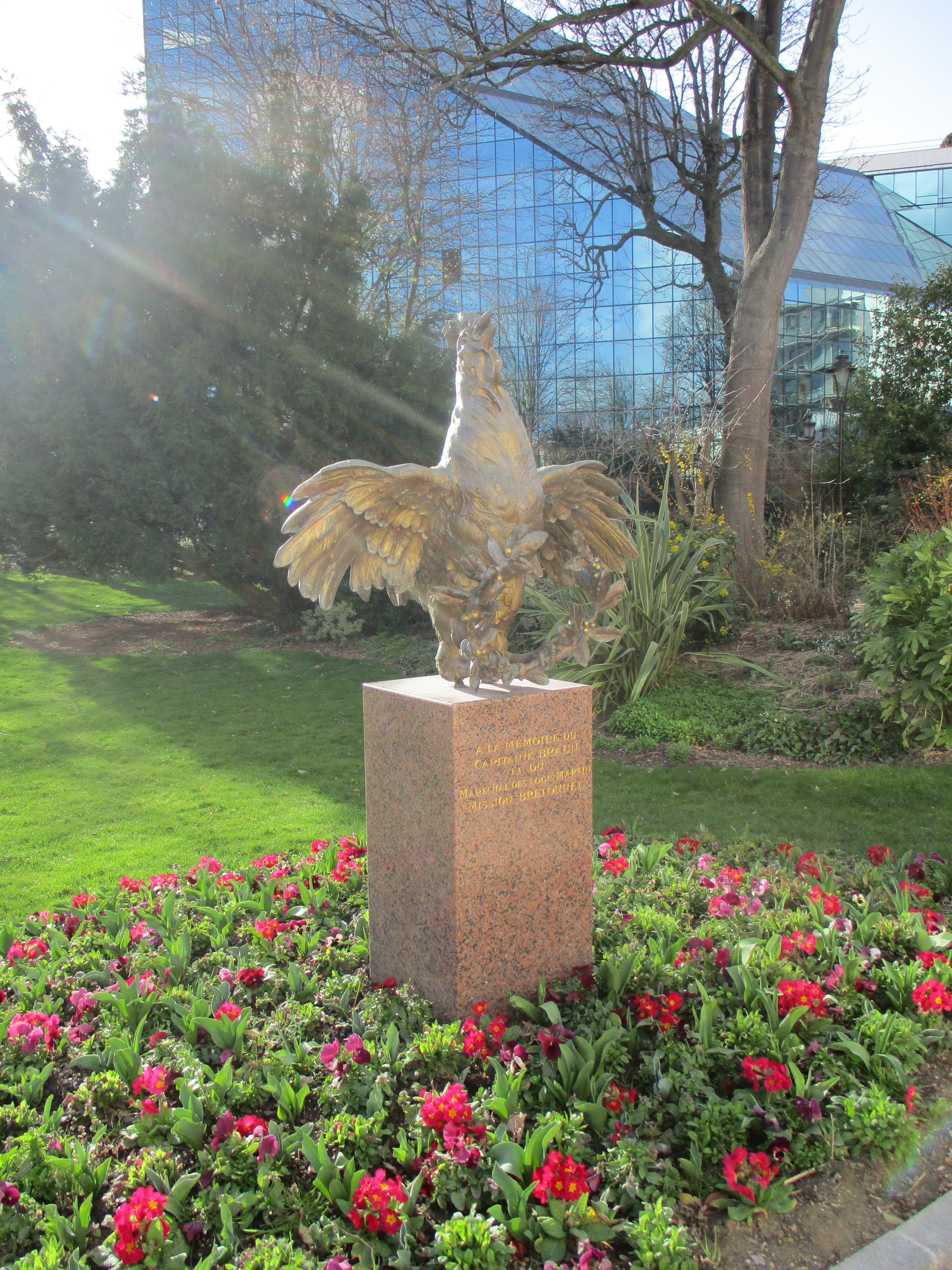 Monument dédié au capitaine Braun et au maréchal des logis Martin, tués à la bataille de Togbao le 17 juillet 1899 (actuel Tchad). Parc de la Planchette à Levallois-Perret.